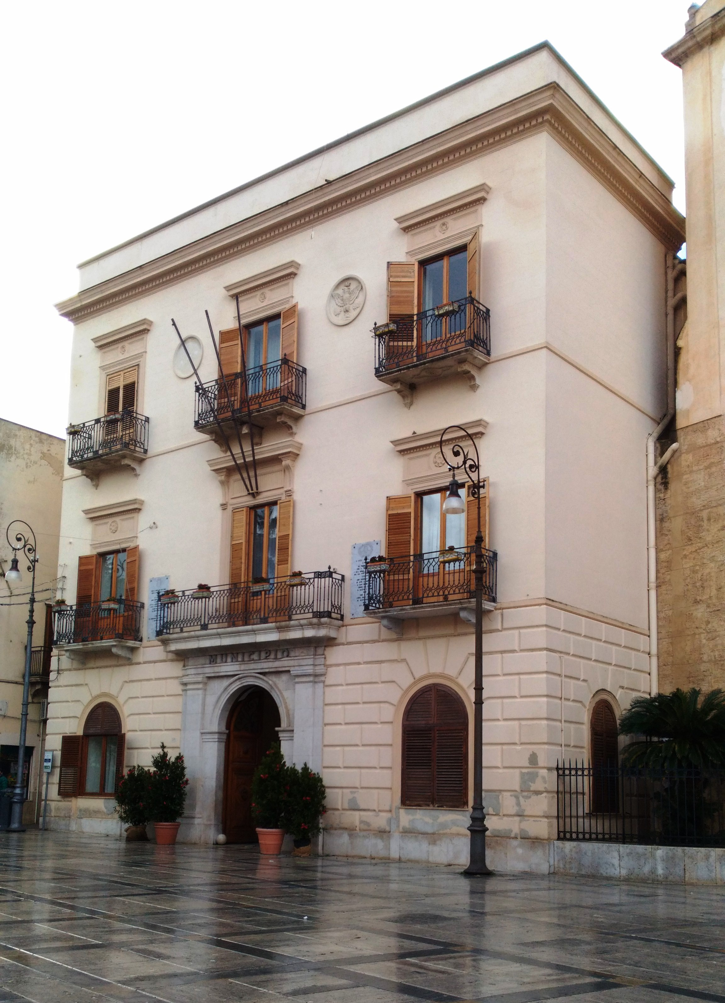 Palazzo Comunale